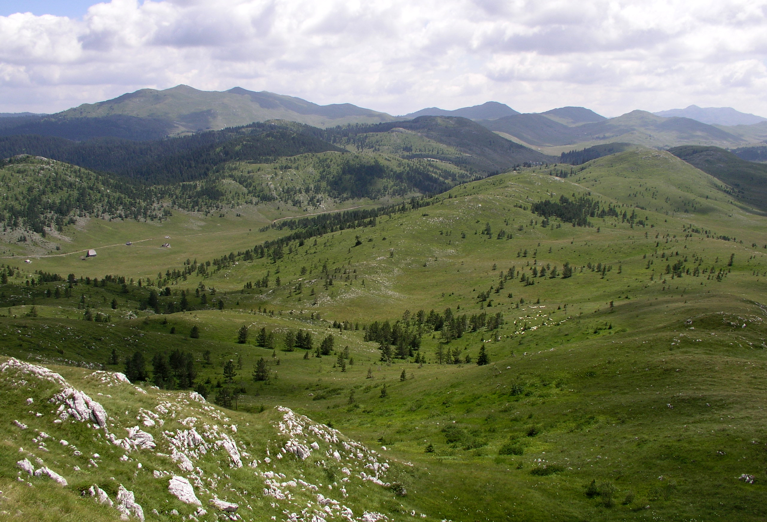 Sinjajevina (NW part)